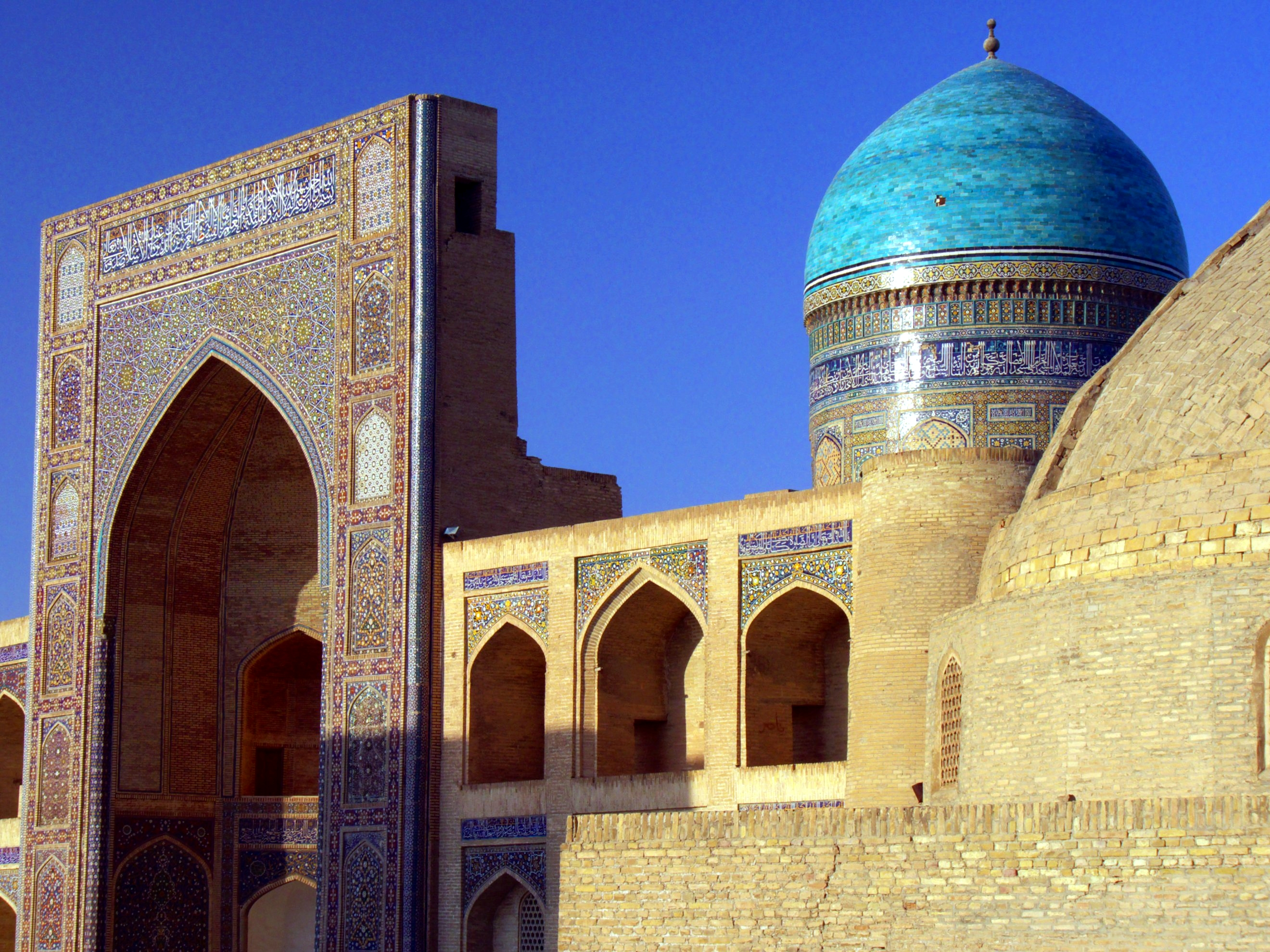 Mir-i-Arab Madrassah, Bukhara